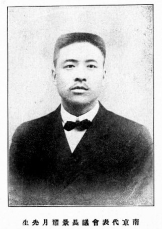 中文（台灣）: 景耀月肖像